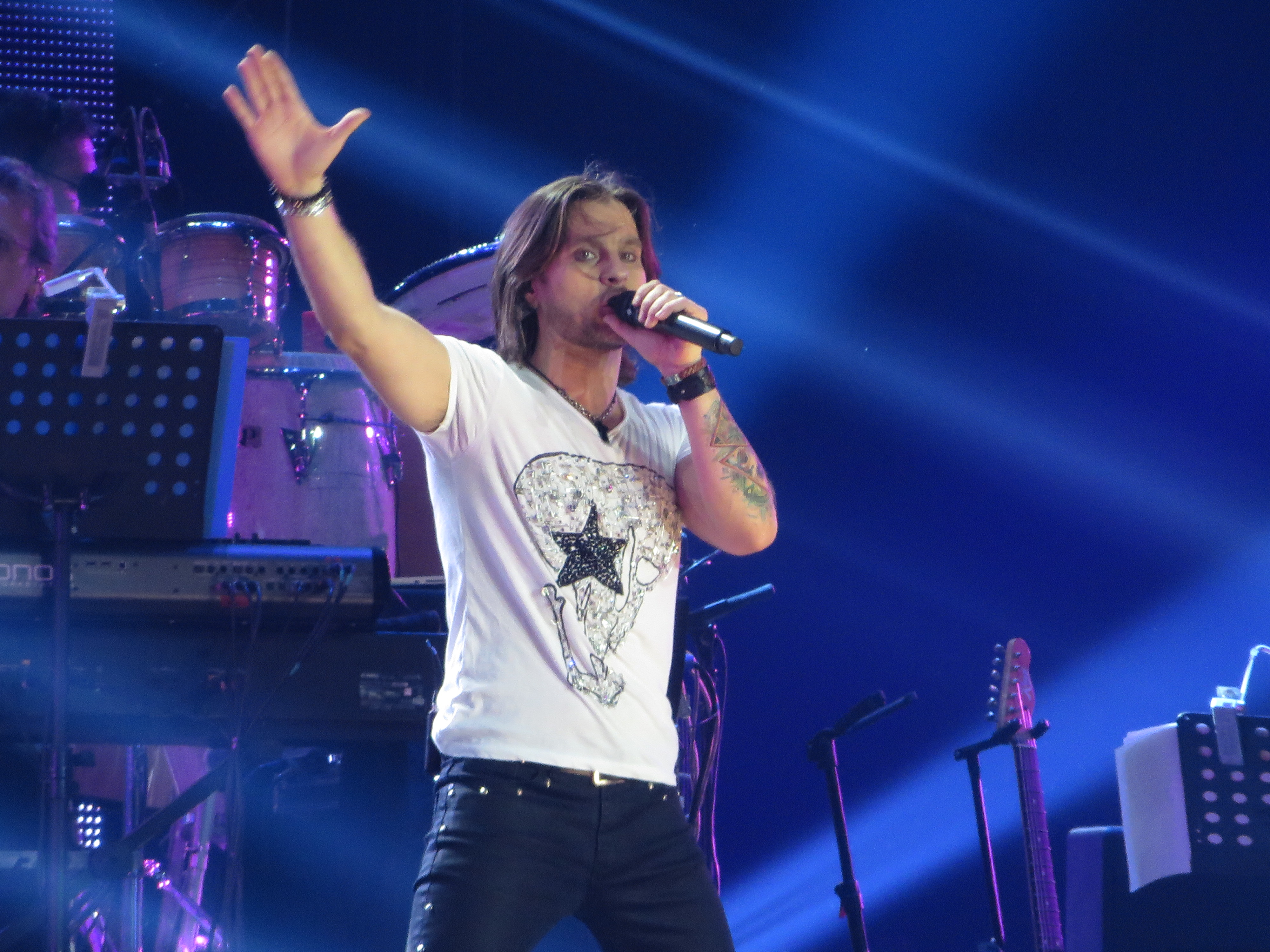 Actuación de Javian en el concierto conmemorativo del 15 aniversario de OT en el Palau Sant Jordi de Barcelona (31-10-2016)